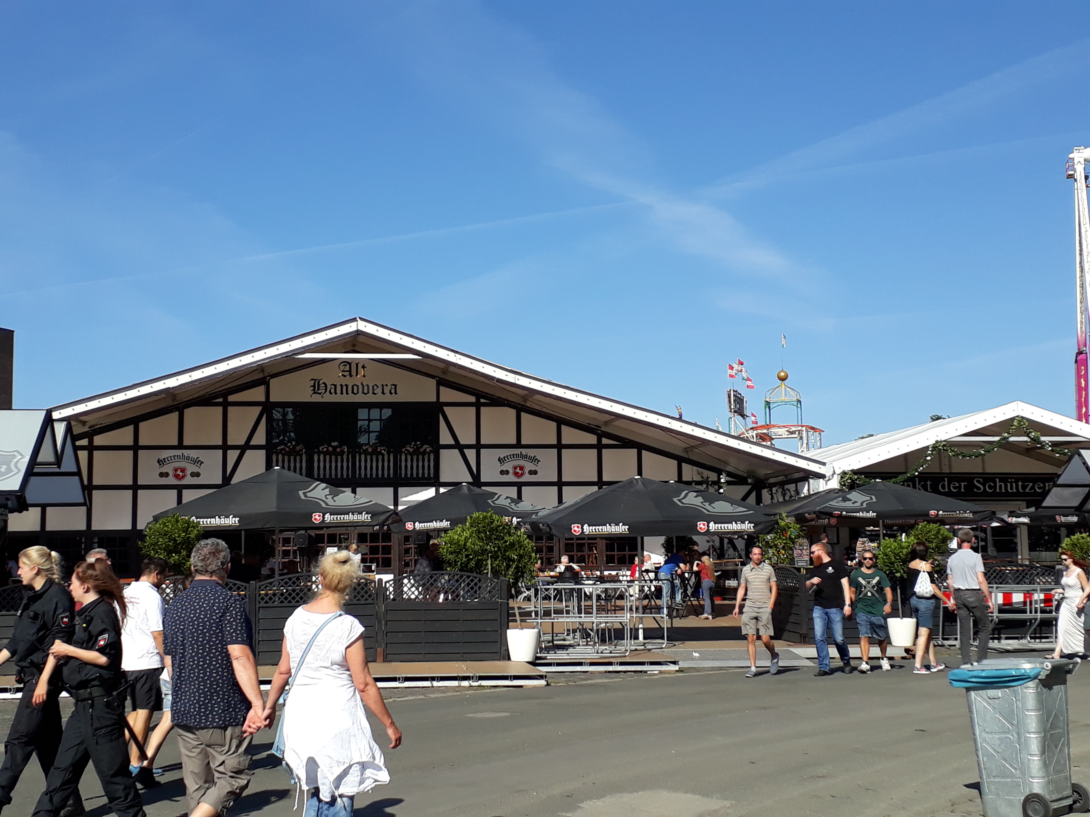 Das Festzelt Alt Hanovera (Haupt- und Nebenflügel) auf dem Schützenfest Hannover 2018